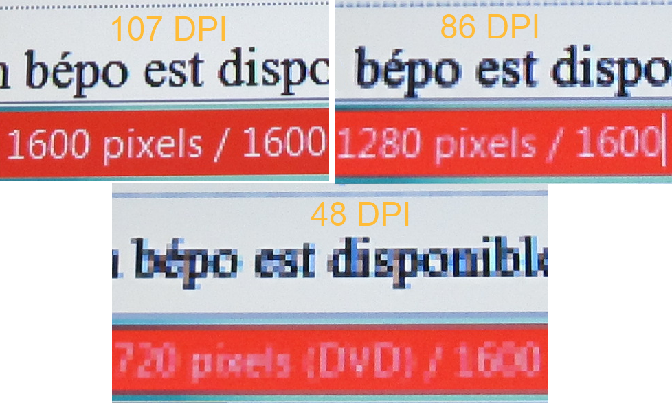 Netteté en fonction des DPI (vision à environ 80 cm d'un écran 17,3 pouces de 1600 pixels de large iso160 avec 2 redimensionnements de la copie d'écran d'un article de fr.wp.